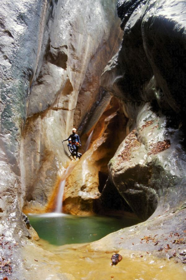 Alla base della calata da 20 metri